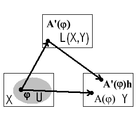 Beziehungen der unterschiedlichen Abbildungen bei der Frechet Ableitung